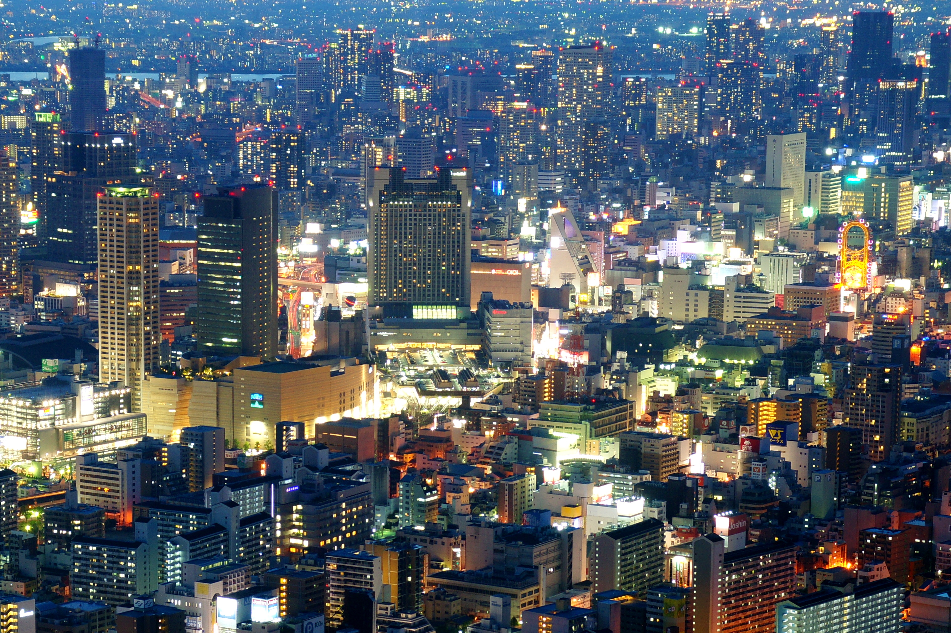 あべのハルカスより難波夜景